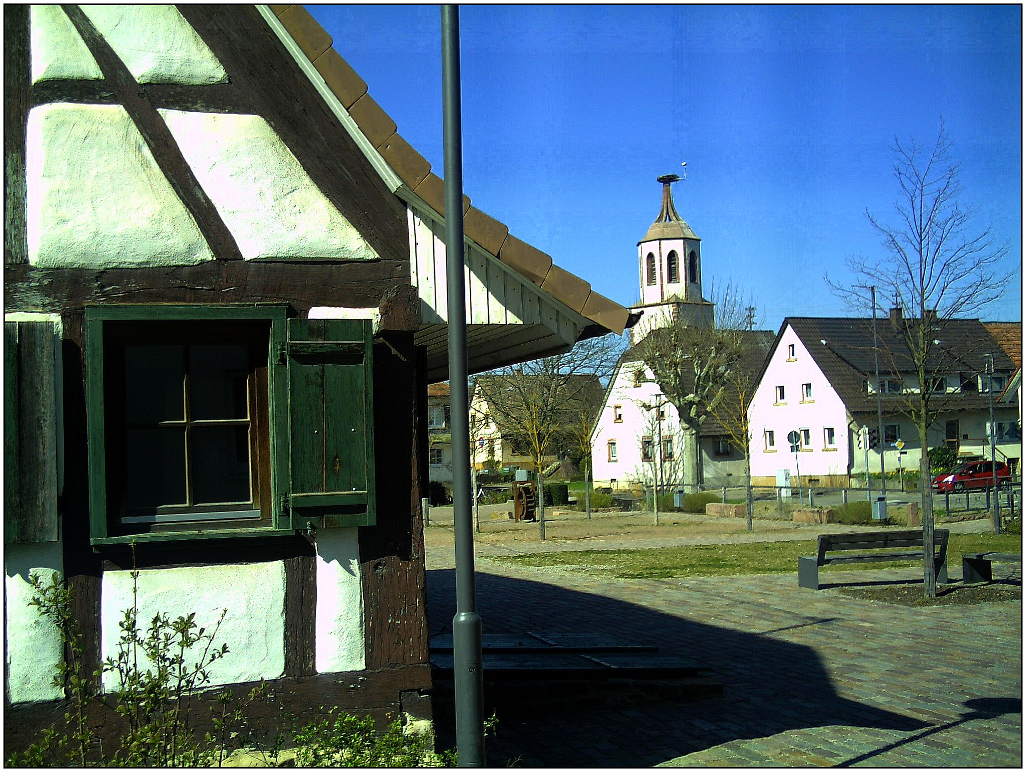 Frühling